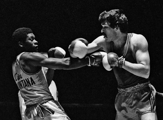 Turneul de box "Centura de aur", găzduit de Palatul Sporturilor și Culturii din Capitală; meciul dintre românul Georgică Donici (dr.) și cubanezul Julio Quintana (stg.) (1983)